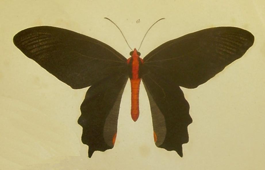 Papilio semperi male